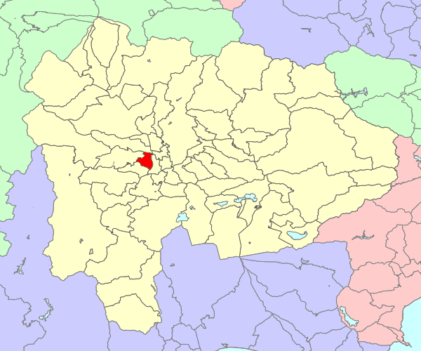 山梨県中巨摩郡若草町の位置画像。